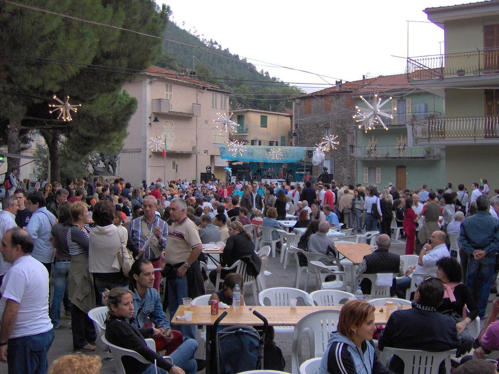 Sagra dello Stoccafisso (2006) di Badalucco, Liguria, Italia